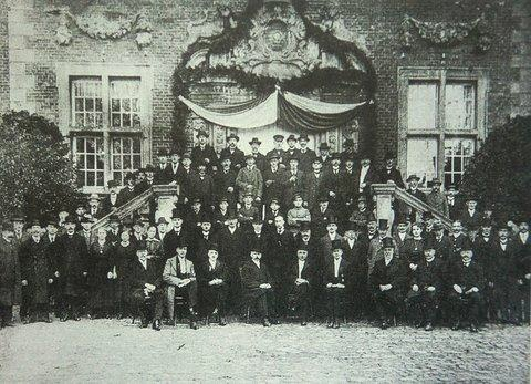 Oldenkott